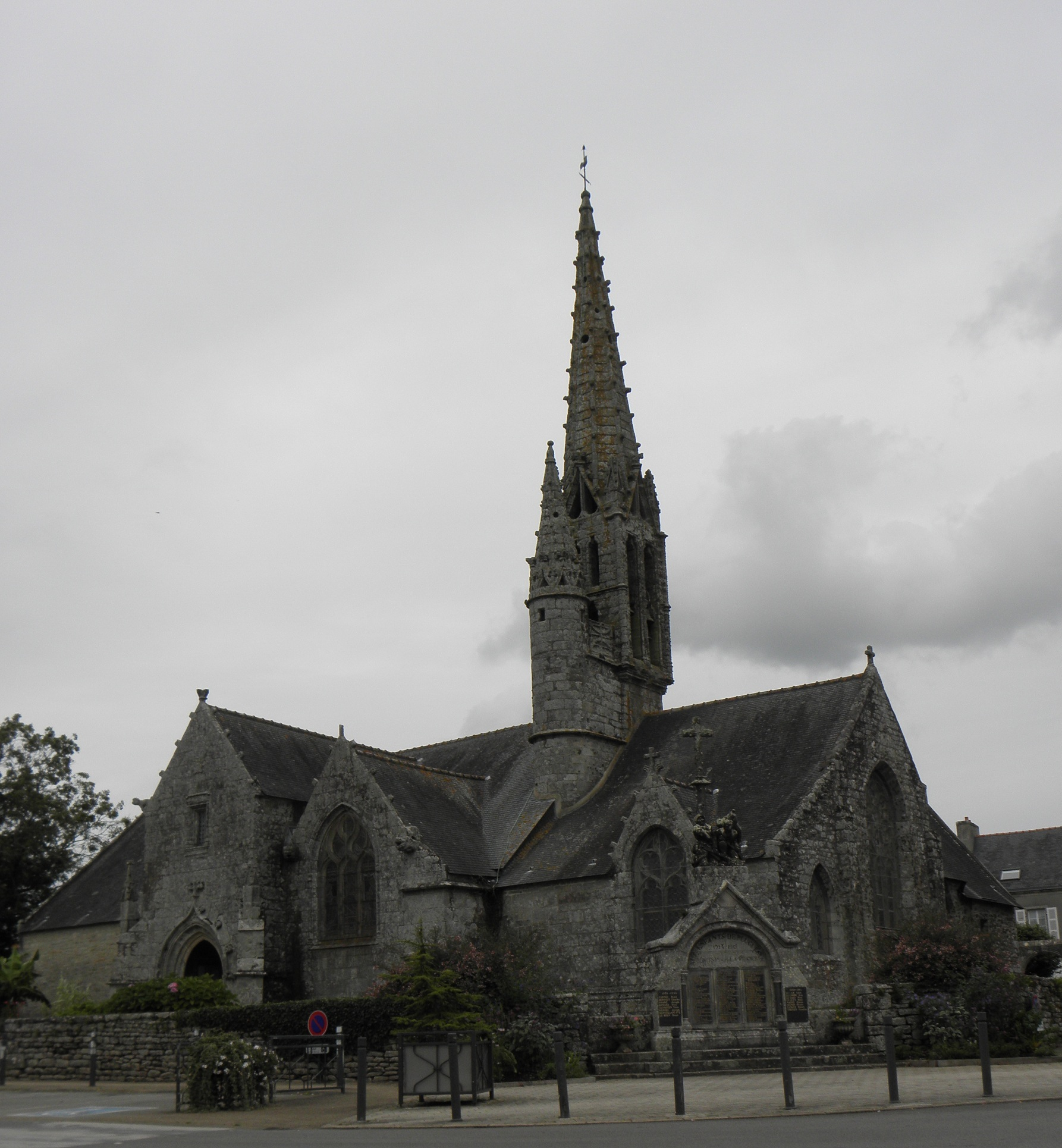 Chevet et façade sud de l'église Saint-Cuffan de Pluguffan (29). .